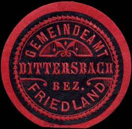 Sealing stamp Title: Gemeindeamt Dittersbach - Bez. Friedland Description: schwarz, rot, geprägt Place: Dittersbach/Böhmen size: 4 cm